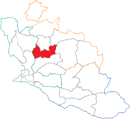 Situation du canton dans le département de Vaucluse (France)